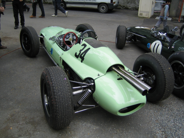 Lotus 24 Climax FWMV Pau GP 2007